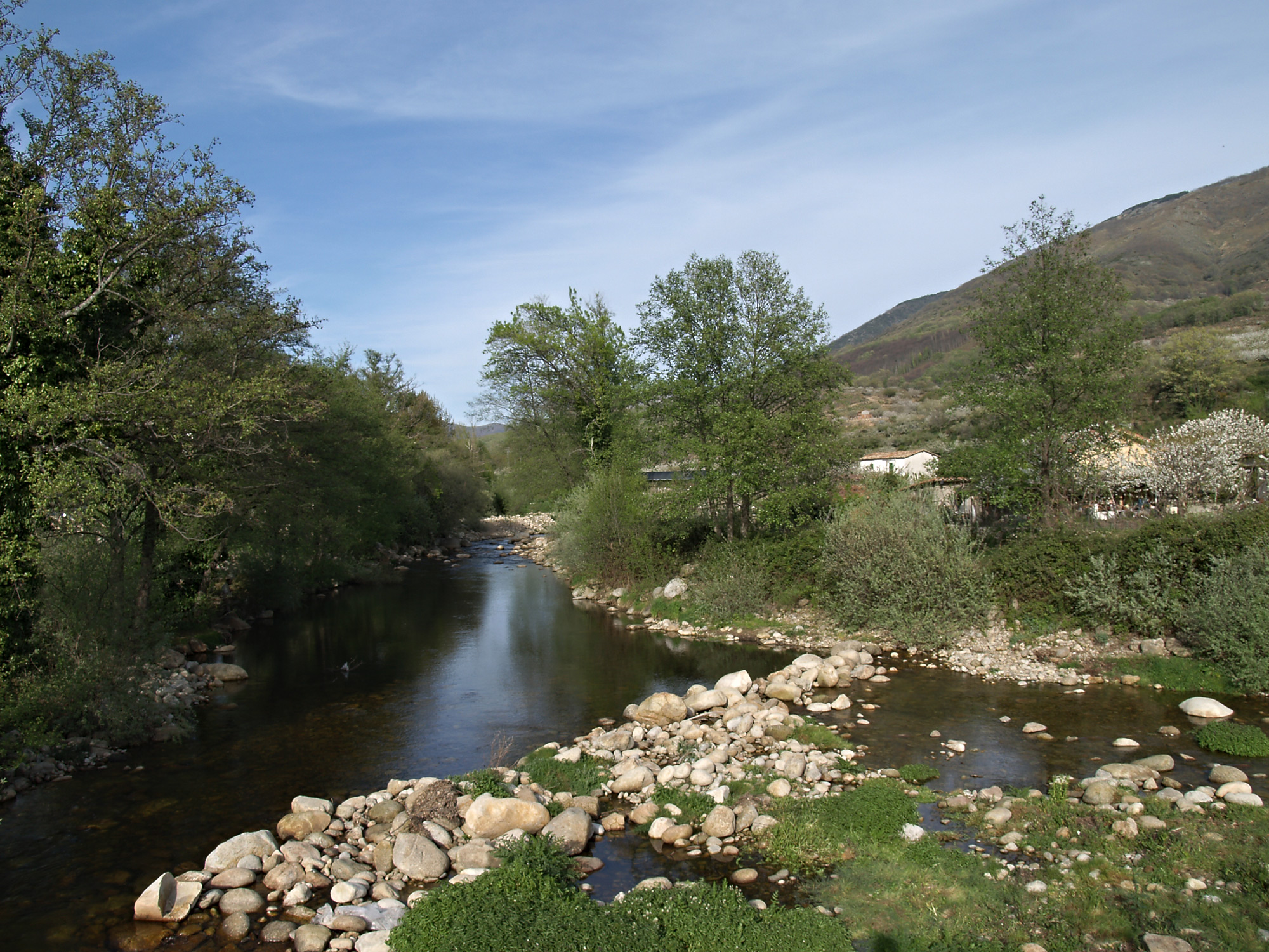 Río Jerte. Jerte, Cáceres.